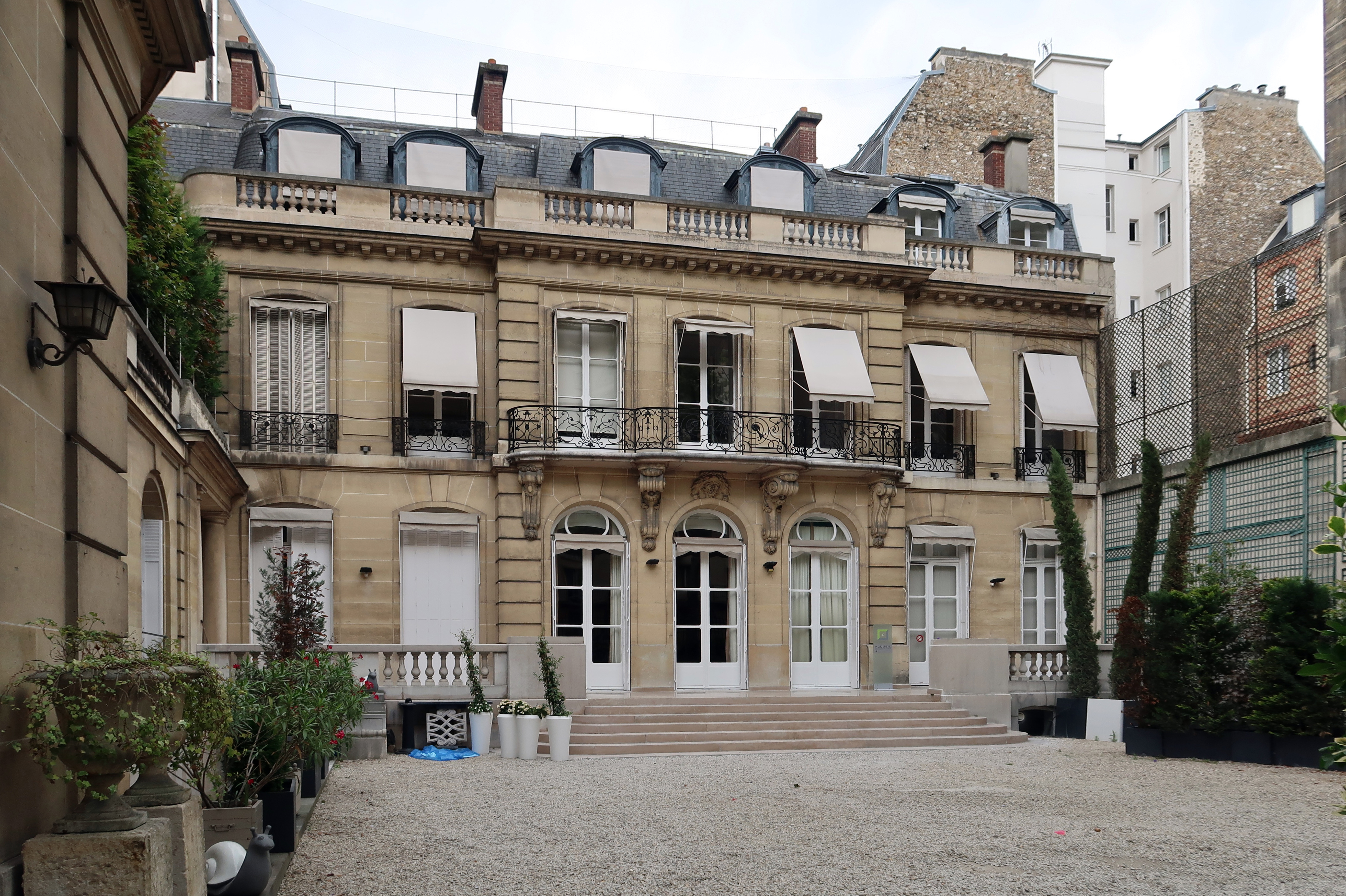 Musée de la Contrefaçon, 16 rue de la Faisanderie (Paris, 16e).